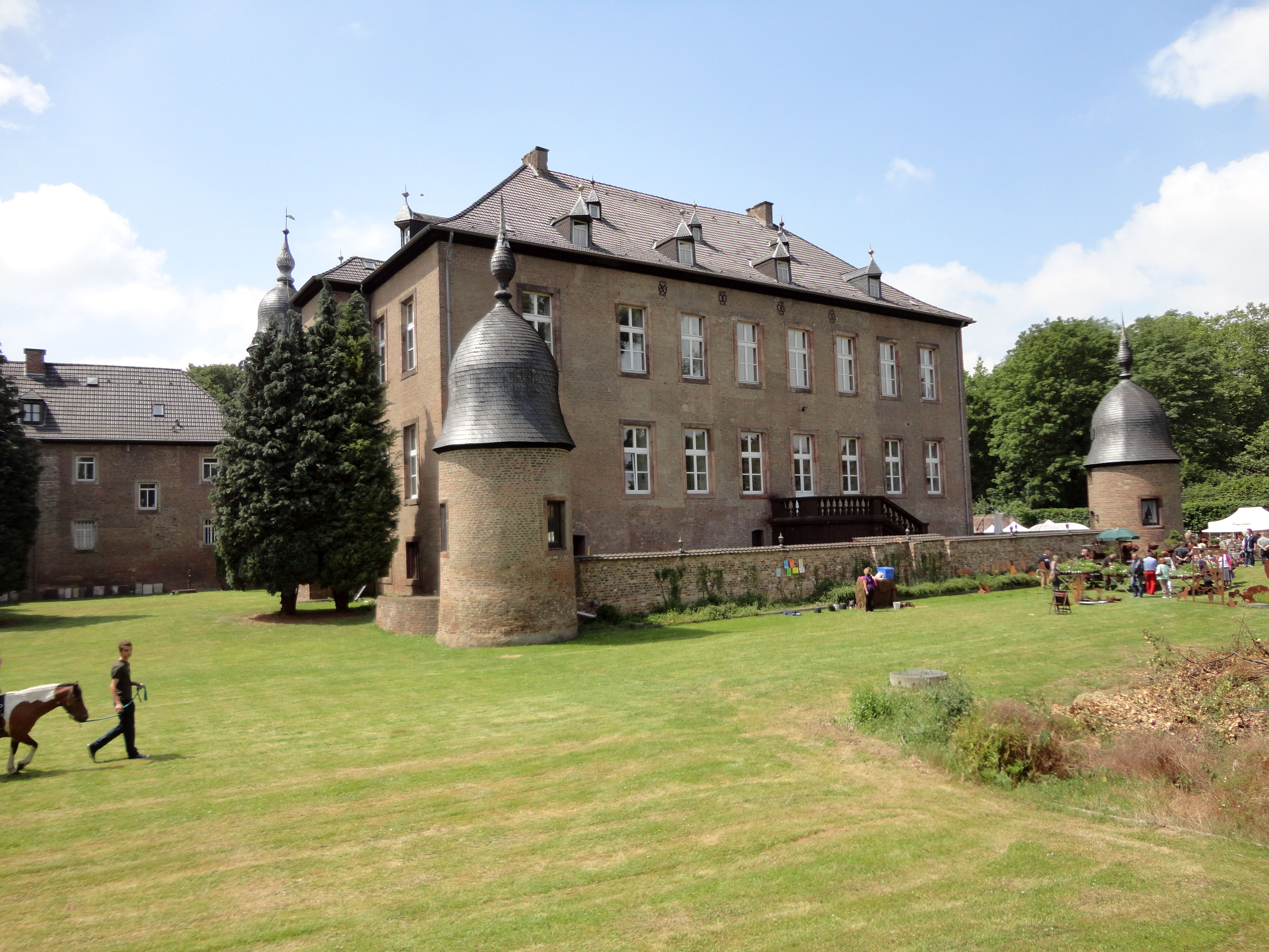 Schloss Nörvenich, Rückseite des Herrenhauses (während des Rosenfestes im Juni 2014)